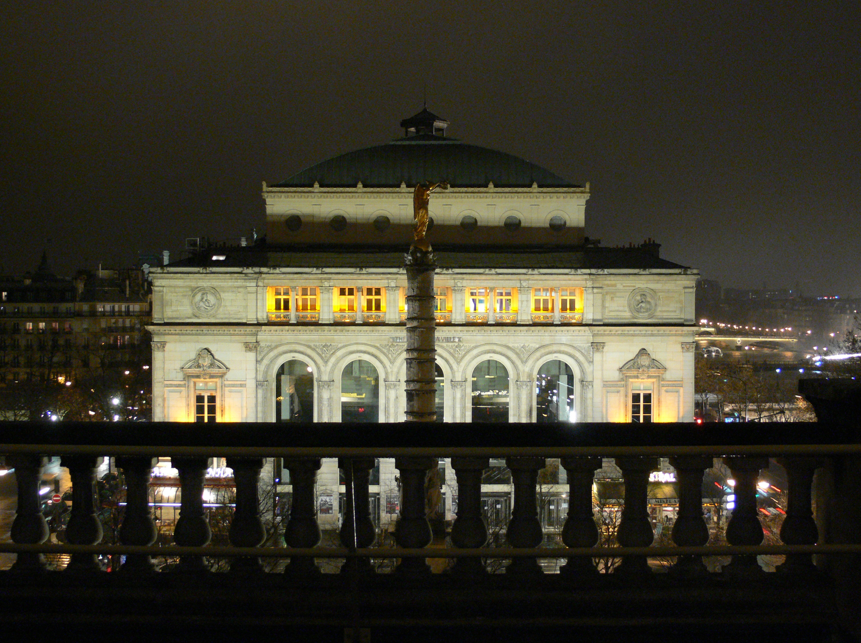 Théâtre de la Ville, vu depuis le balcon du théâtre du Châtelet, de nuit